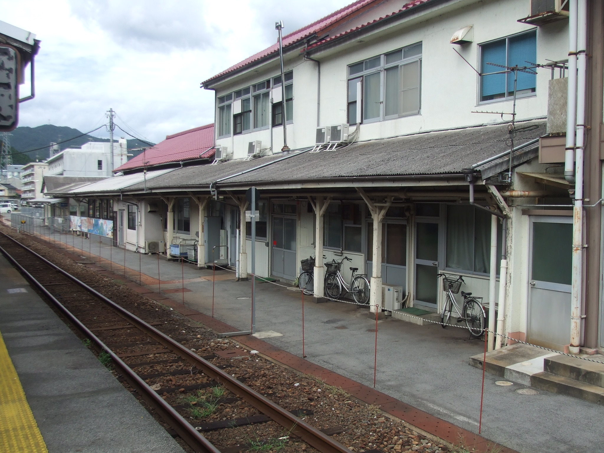 新見駅 ホーム側から見た駅舎